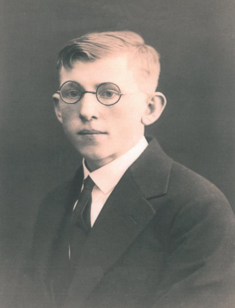 Pavel Křivský, 20. léta 20. století